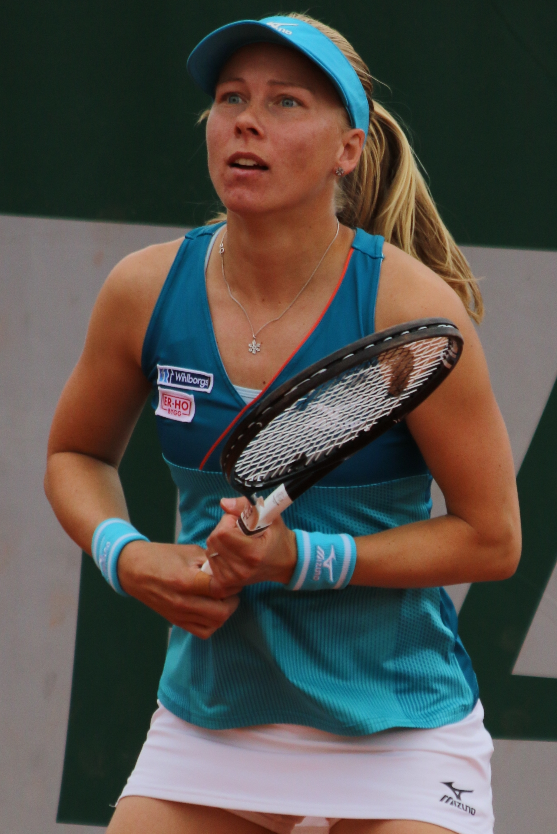 Larsson RG19 (6)